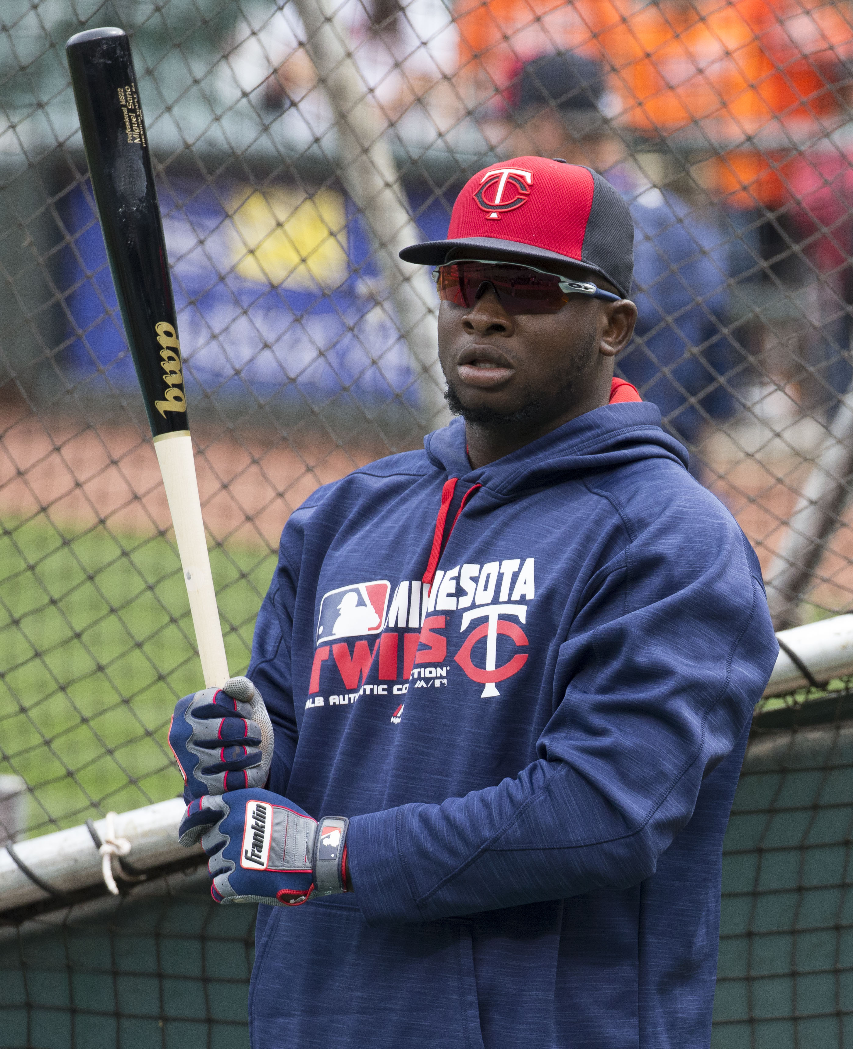 Miguel Sanó in April 2016